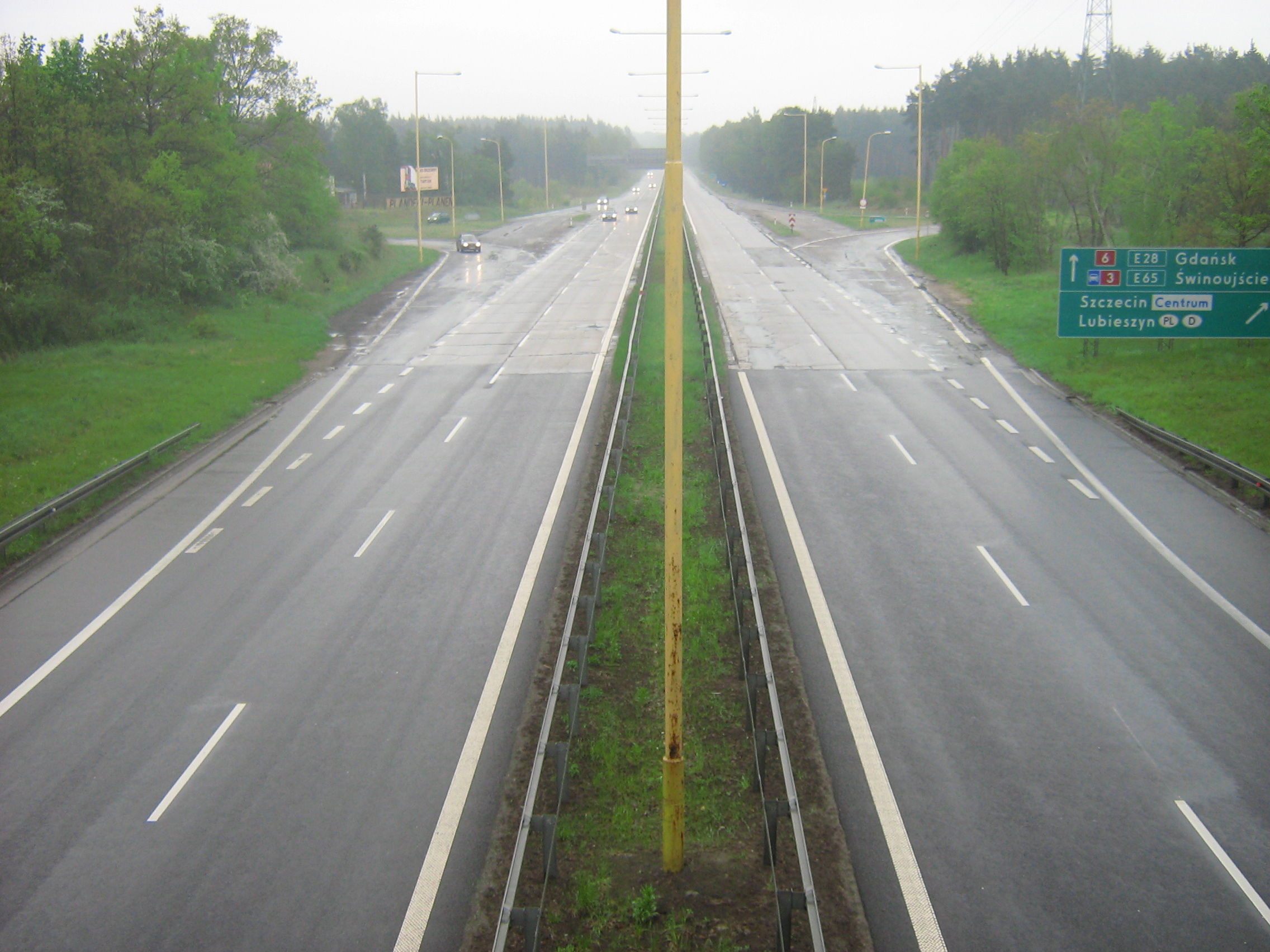 Droga krajowa nr 3 na Kijewie w Szczecinie. Widok w kierunku Świnoujścia